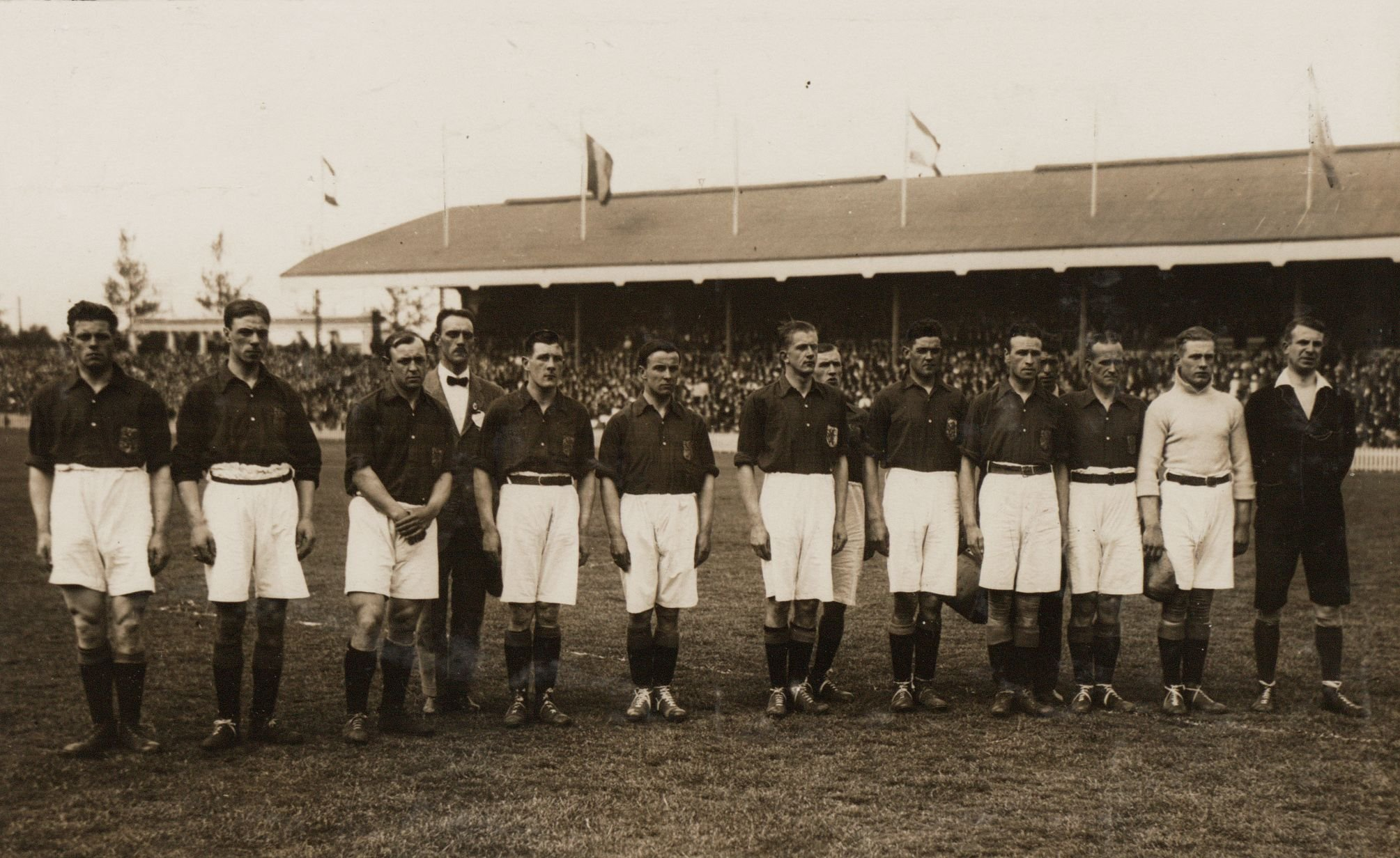 Nederlands elftal voor de interland tegen België. Van links naar rechts: Jan de Natris, Fons Pelser, Henk Hordijk, een Nederlandse official, Jan van Gendt, Boelie Kessler, Dé Kessler, Herman van Diermen (achter Dé Kessler), Piet Stevens, Henk Steeman, oefenmeester Fred Warburton (achter Henk Steeman), Ben Hoogstede, Henk van Tilburg en scheidsrechter Barette. België - Nederland (1-1), gespeeld op 15 mei 1921 op het terrein van Beerschot (Het Kiel) te Antwerpen. Opstelling: Henk van Tilburg (NOAD), Fons Pelser (Ajax), Piet Stevens (Willem II), Henk Hordijk (Ajax), Ben Hoogstede (NAC), Piet Steeman (Sparta), Boelie Kessler (HVV), Dé Kessler (HVV, aanvoerder), Jan van Gendt (De Spartaan), Herman van Diermen (Blauw Wit) en Jan de Natris (Ajax).